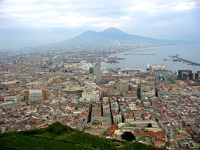 Immagine di una veduta del golfo di Napoli